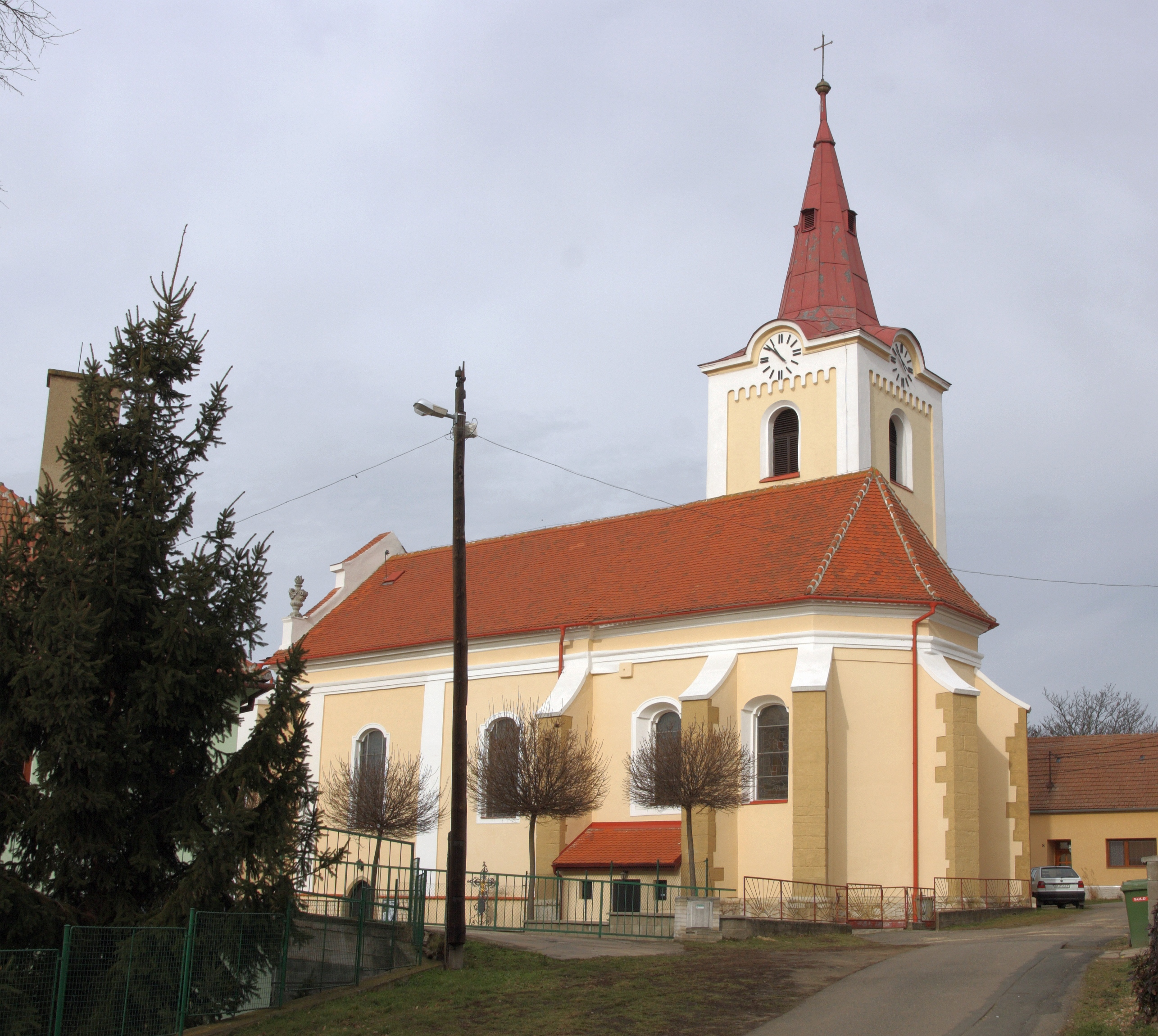 Medlov - kostel svatého Bartoloměje.